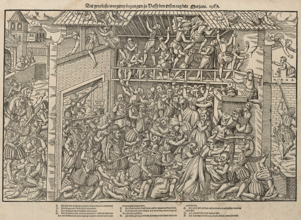 Massacre de Wassy, 1er mars 1562, gravure de Tortorel et Perrissin, avec une légende en allemand.